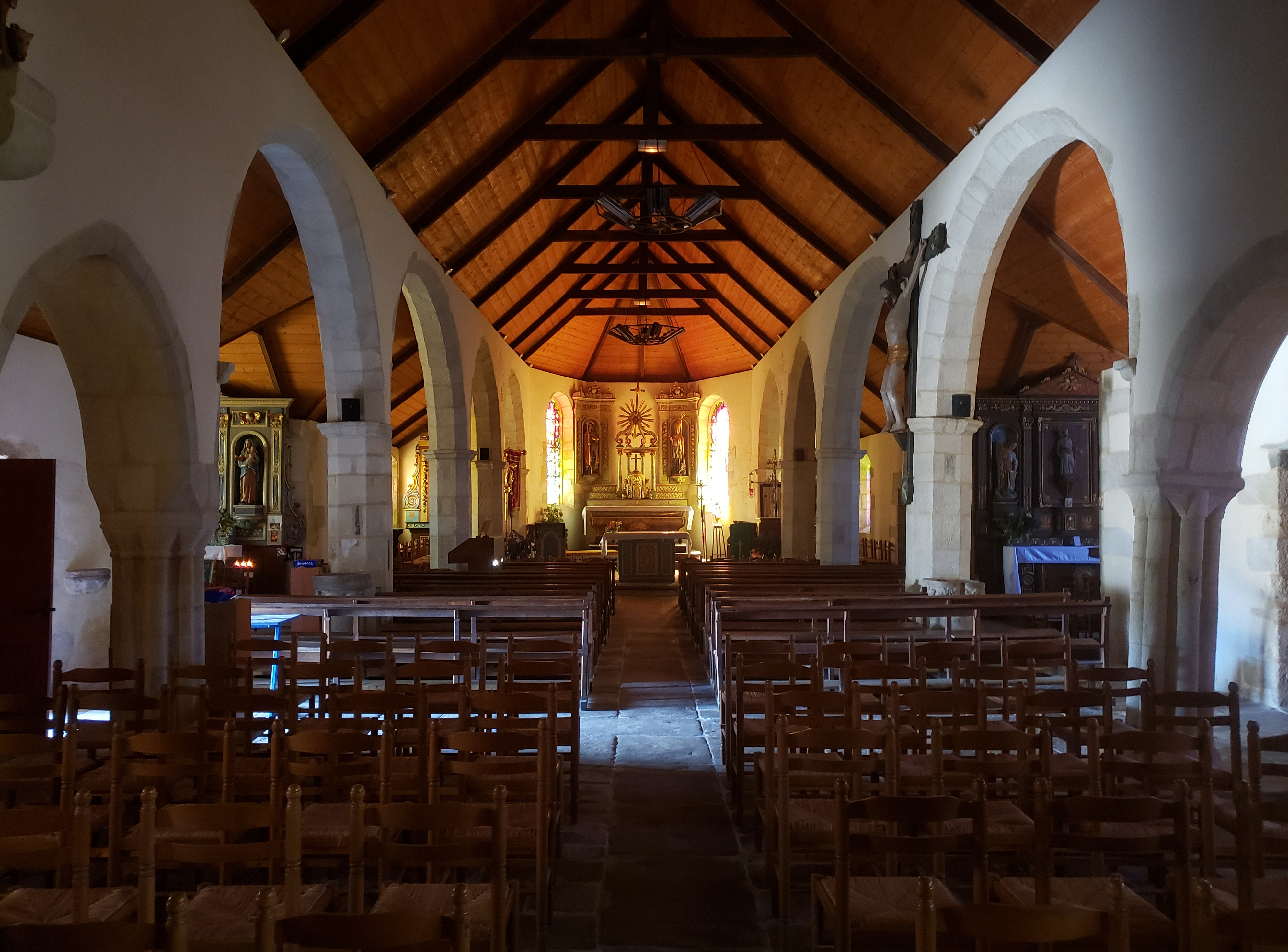 Église Saint-Gorgon de Plovan